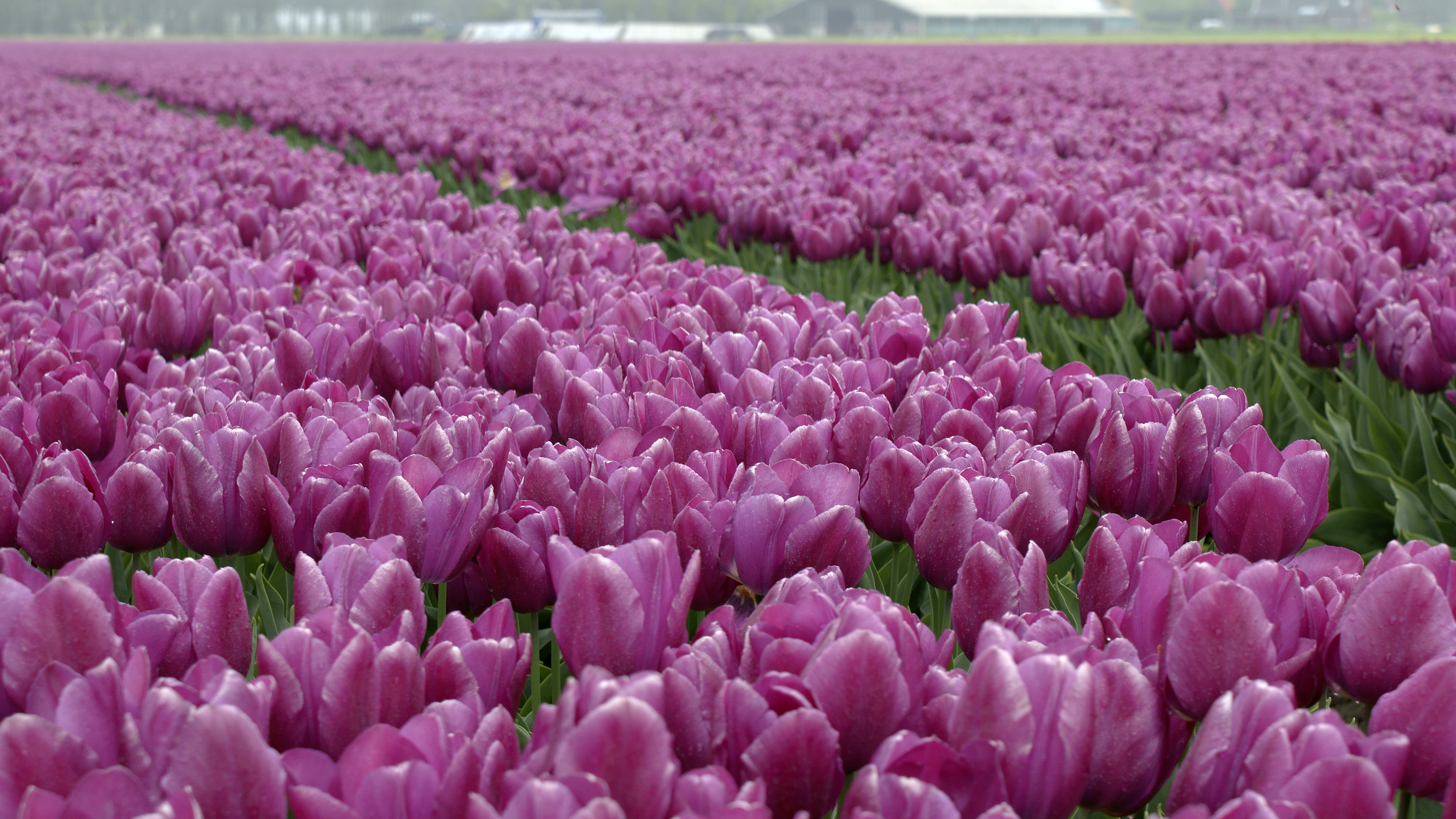 Kwiatki sobie rosną